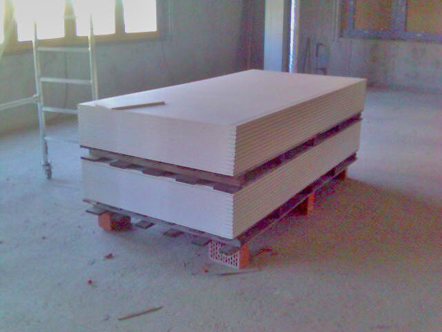 'n Stapel gipsborde